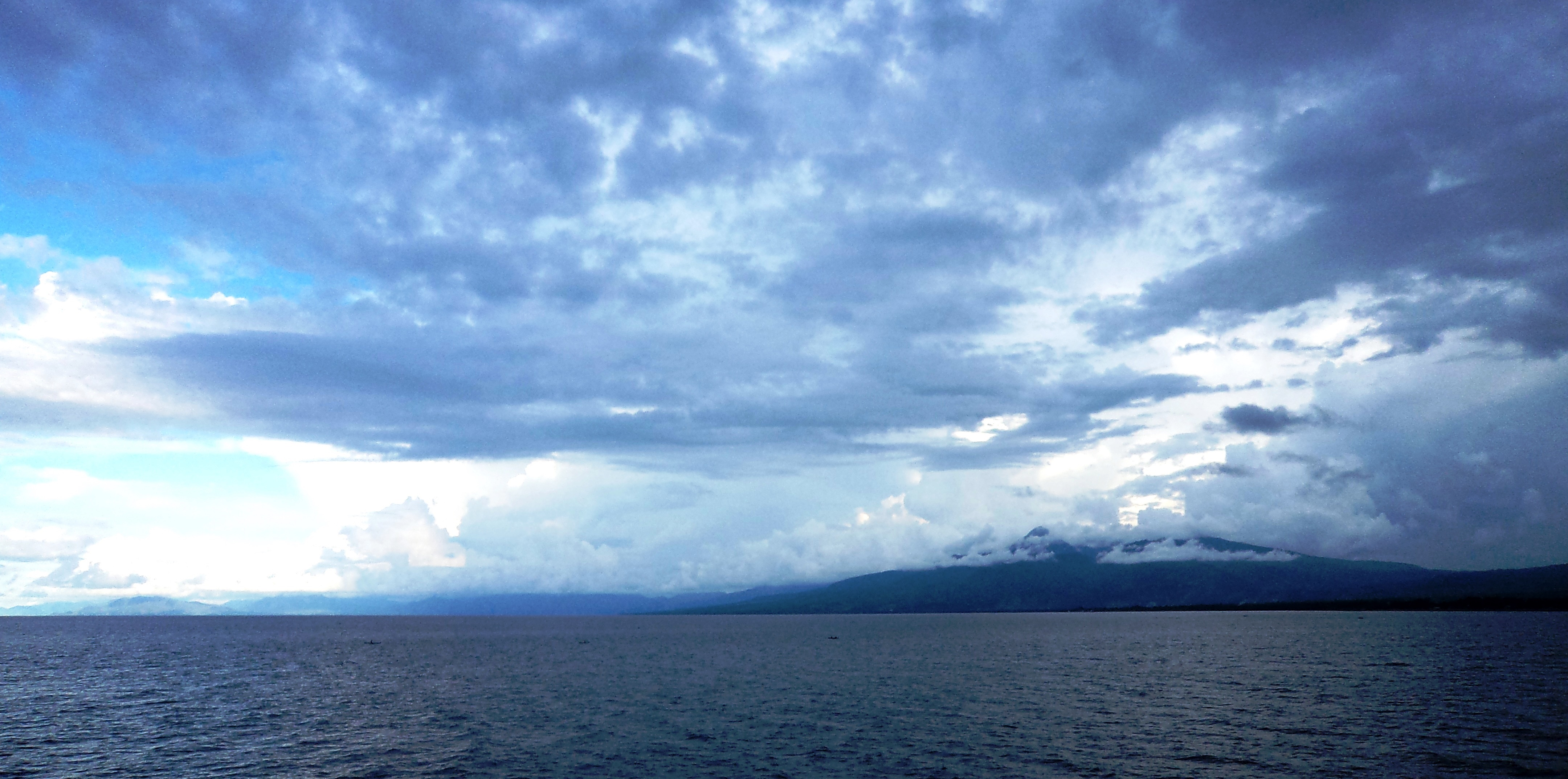 Maumere, Nusa Tenggara Timur.